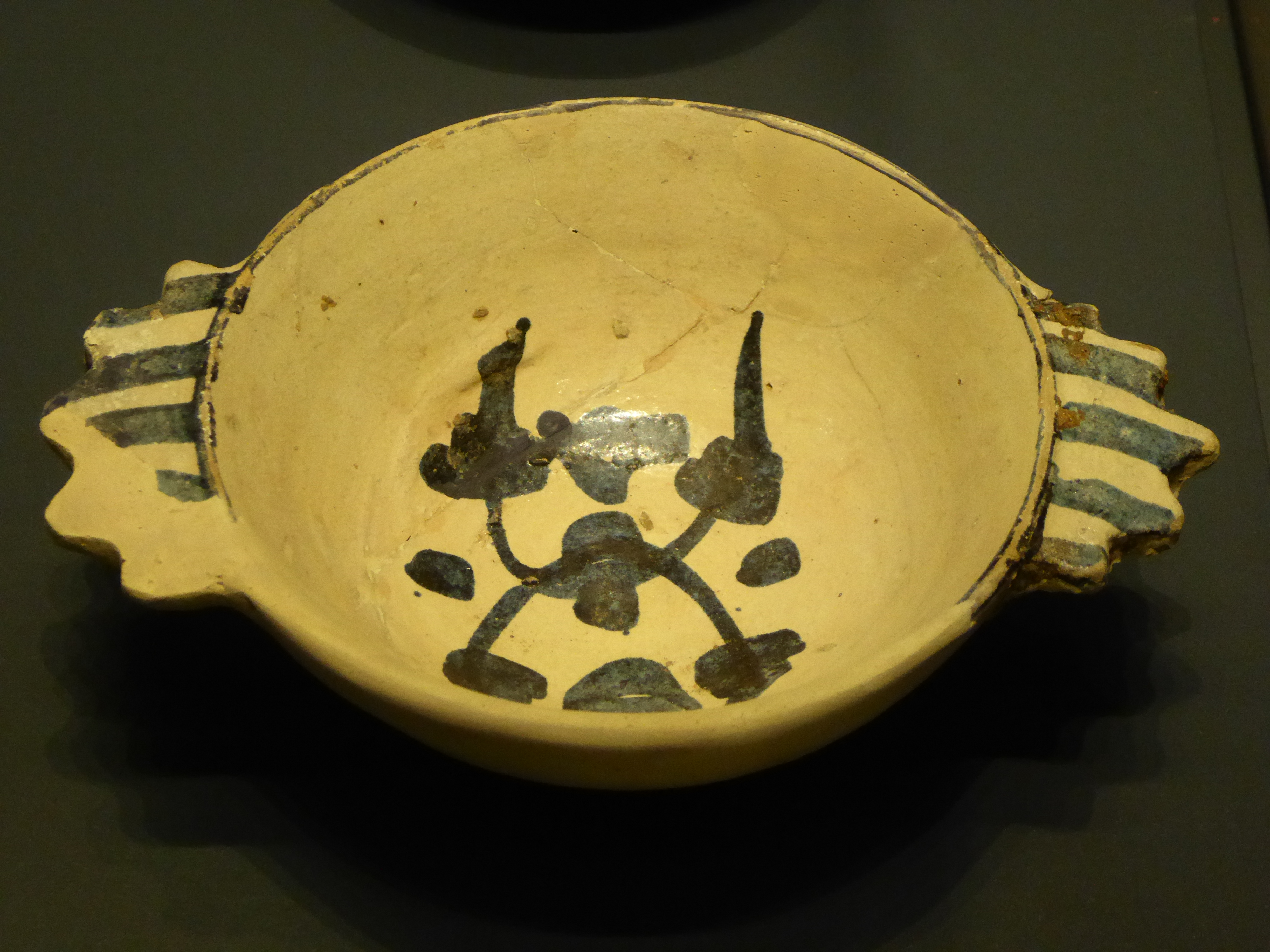 Escudilla con asas de orejeta de los talleres de Muel. Cerámica vidriada de color azul. Siglo XVI.